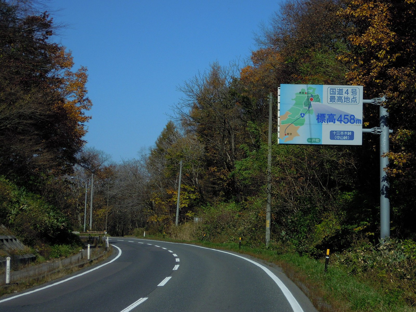 岩手県二戸郡一戸町の国道4号線上にある十三本木峠の看板